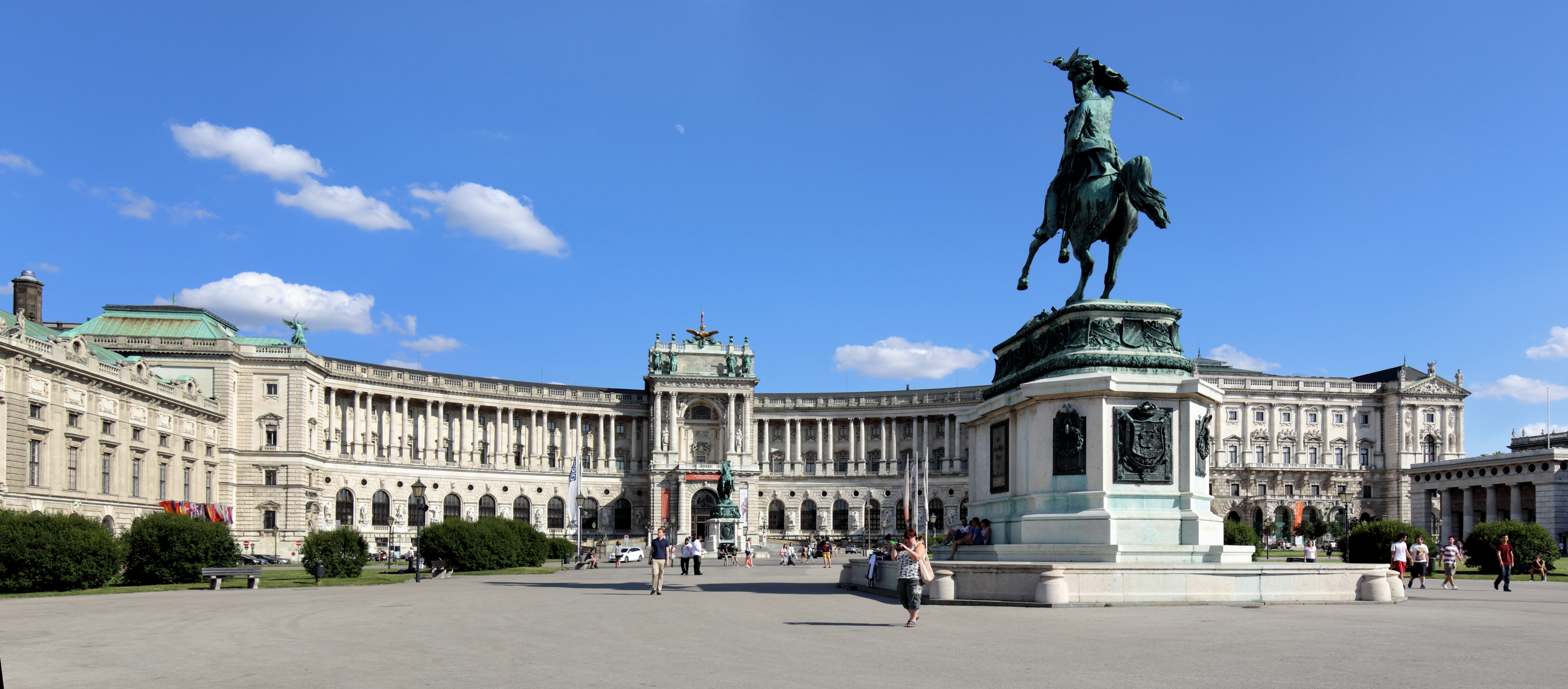 Die Hauptfassade der Neuen Burg in der österreichischen Bundeshauptstadt Wien. Im Vordergrund der Heldenplatz mit dem Erzherzog-Karl-Reiterdenkmal, ganz links der Festsaaltrakt und ganz rechts das Äußere Burgtor.